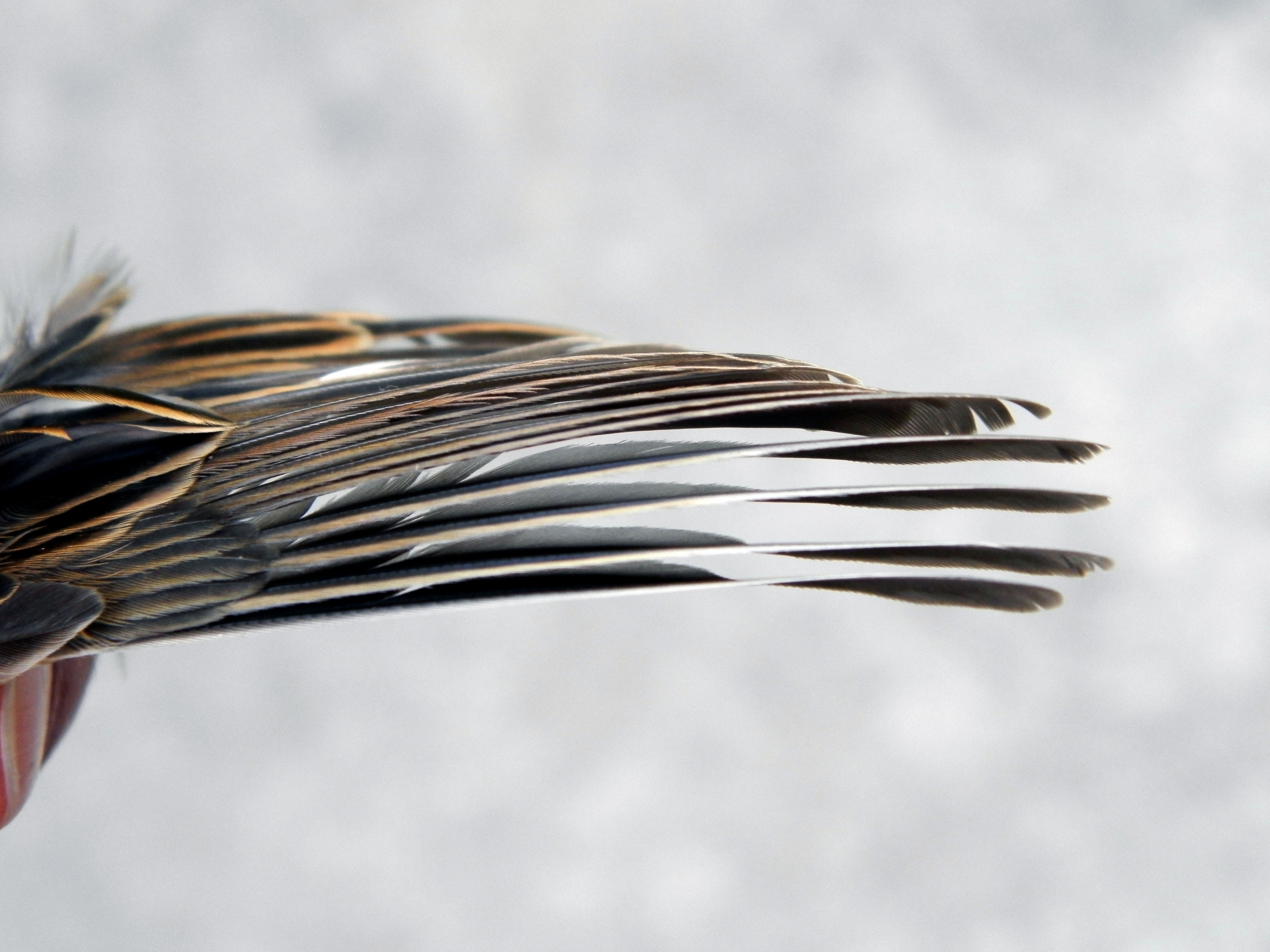 スズメの翼。揚力を発生させる構造を見ることが出来る